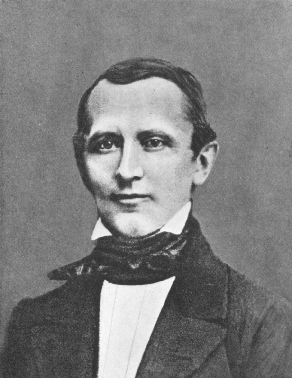 Leinenfabrikant A.W. Kisker in Bielefeld